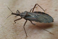 especie: Rhodnius prolixus autor: Thierry Heger localidad: Venezuela